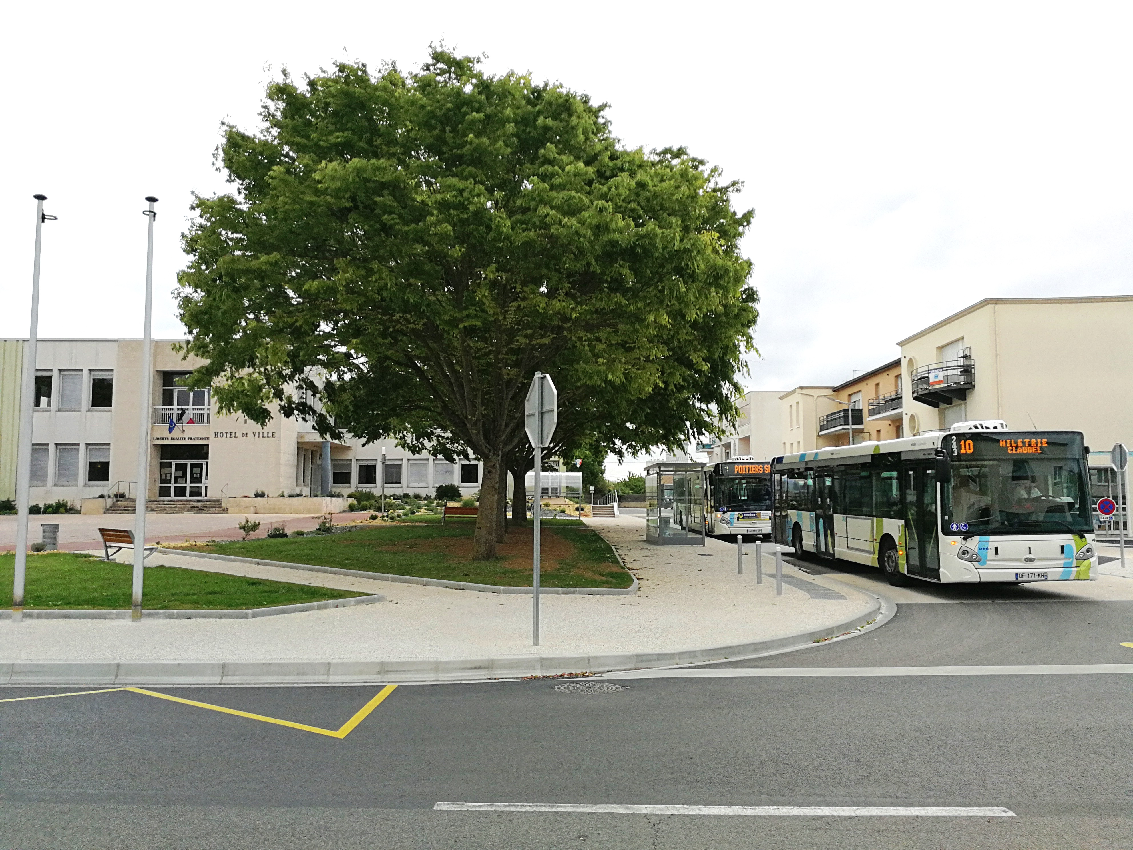 Bus du réseau Vitalis à l'arrêt "Buxerolles mairie"